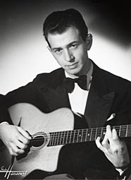 Portrait d'Henri Crolla